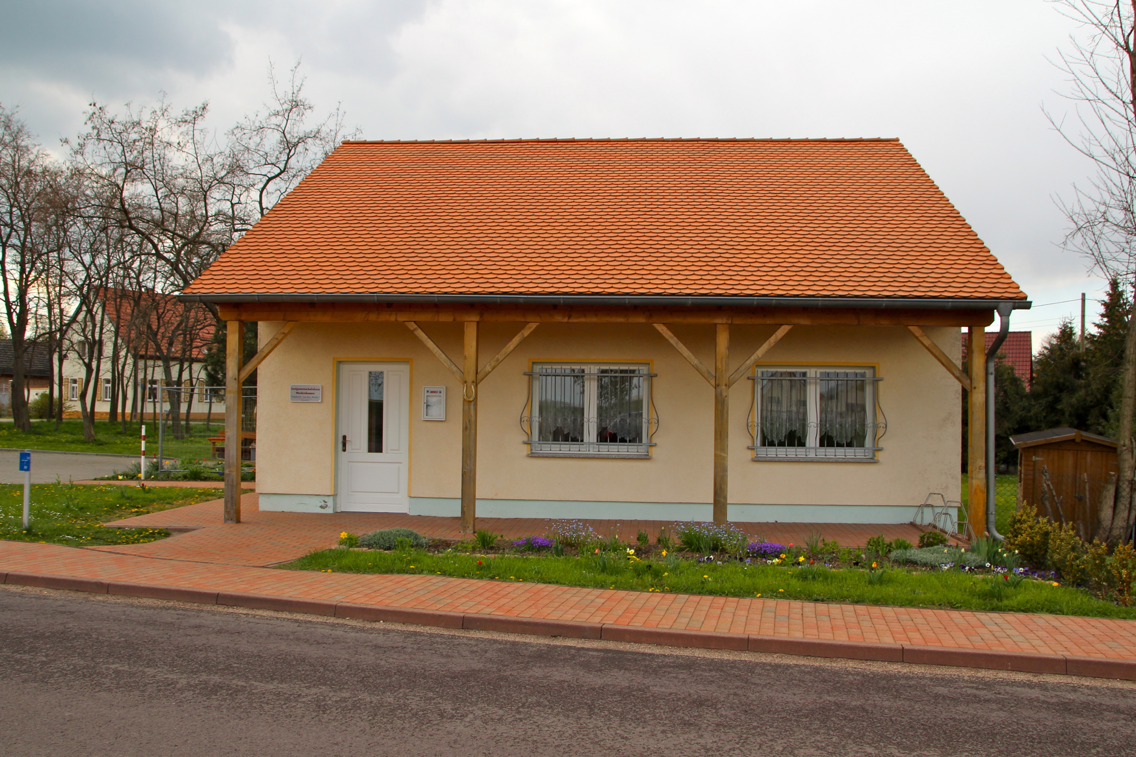 Werdershausen ist ein Ortsteil Gröbzigs der Gemeinde Südliches Anhalt in Sachsen-Anhalt, Deutschland.